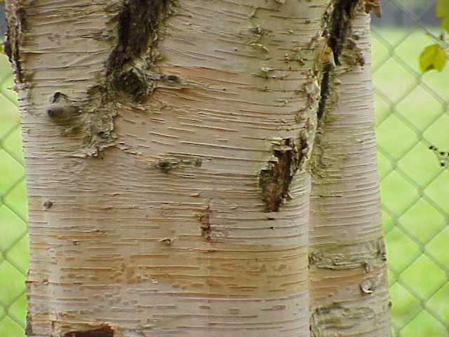 Species: Betula papyrifera Family: Betulaceae Image No. 2